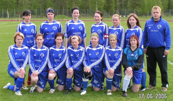 Kolarin Kontion naiset 2006